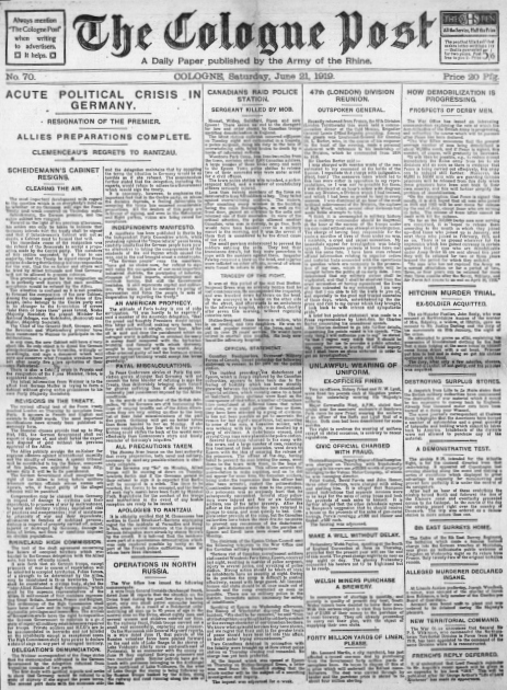 Titelblatt der Zeitung "Cologne Post" v. 21. Juni 1919